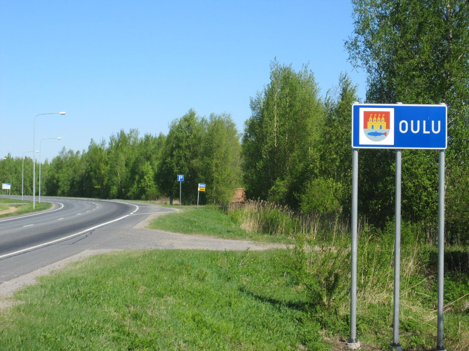 Oulun kaupunginraja seututiellä 847 (Vanhalla Nelostiellä) Kempeleen Kuivalanperältä katsottuna.